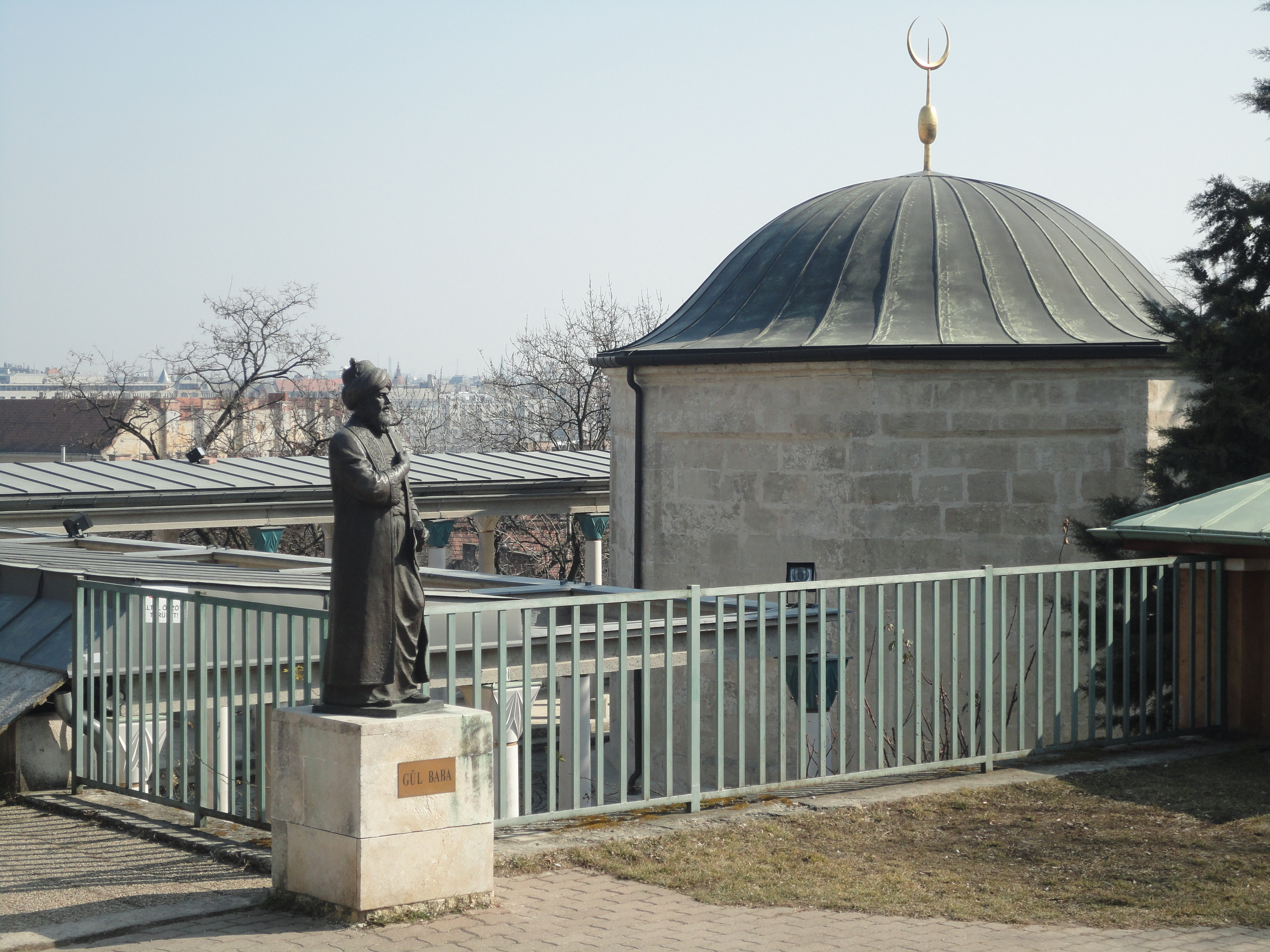 Gül Baba türbéje és szobra, Budapest II. kerület This is a photo of a monument in Hungary. Identifier: 290